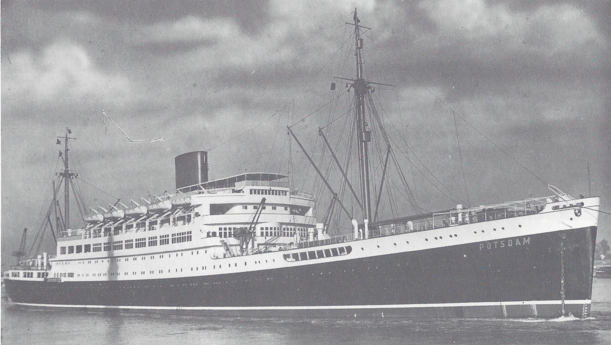 Schnelldampfer Potsdam.